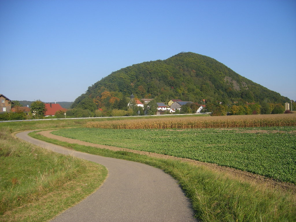 Donauradweg at Sulzbach a.d. Donau (Donaustauf municipality)